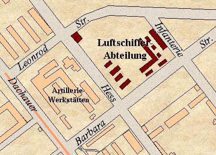 Grundriss der Luftschiffer-Kaserne (später: Luitpoldkaserne in München um 1922